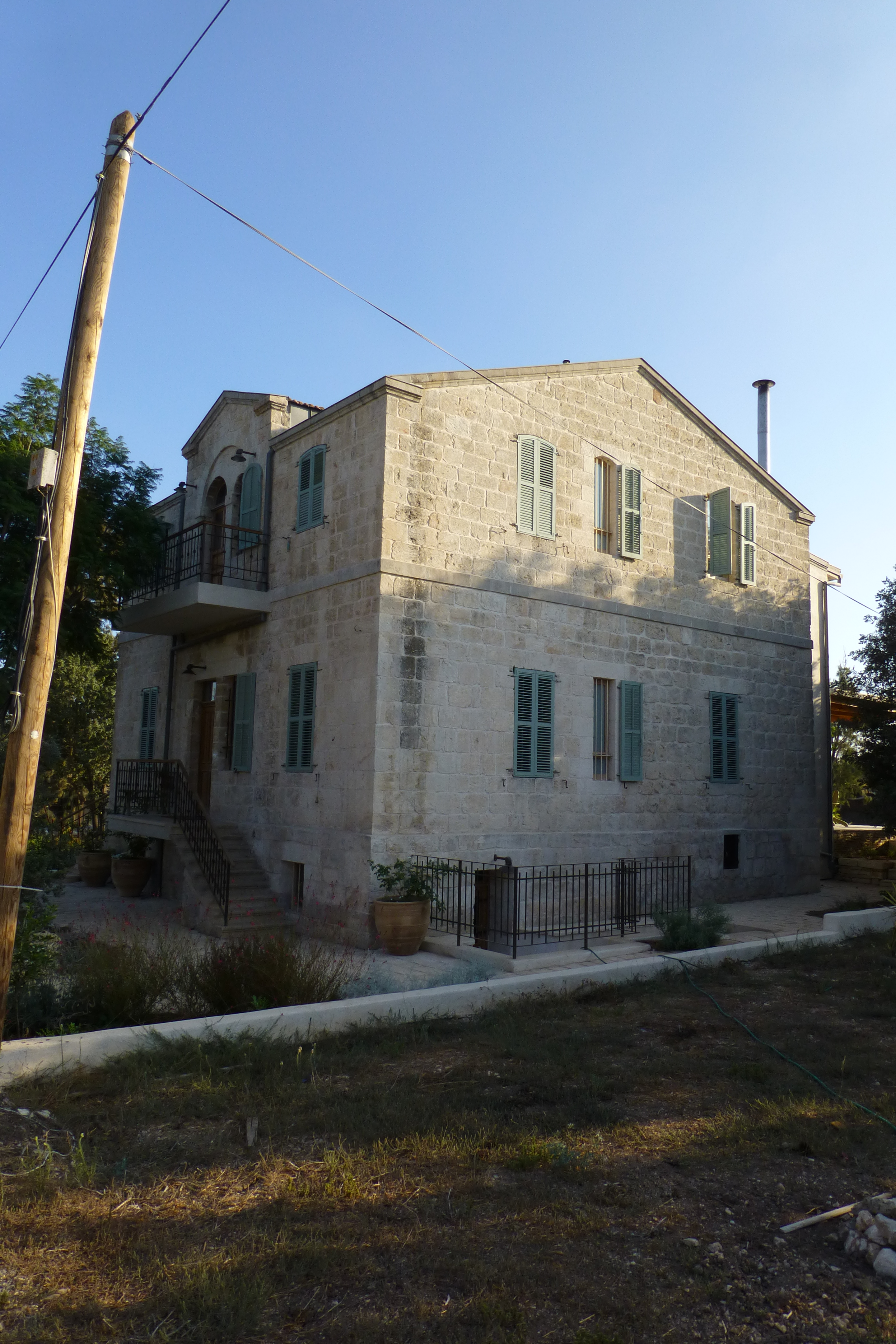 ראשוני המתיישבים באתר היישוב אלוני אבא היו בני הדור השני של תנועת הטמפלרים הגרמנים, אשר הקימו במקום בשנת 1907 מושבה חקלאית קטנה ושמה "ולדהיים".